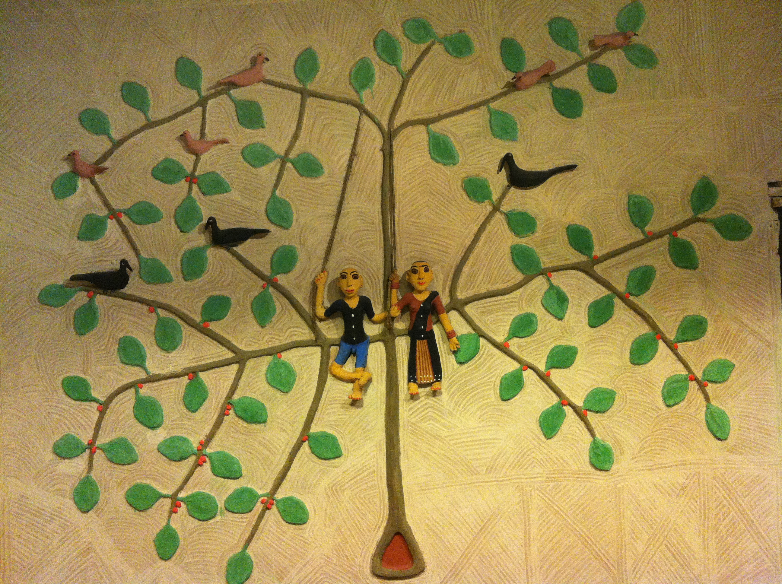 भित्तिचित्र कला